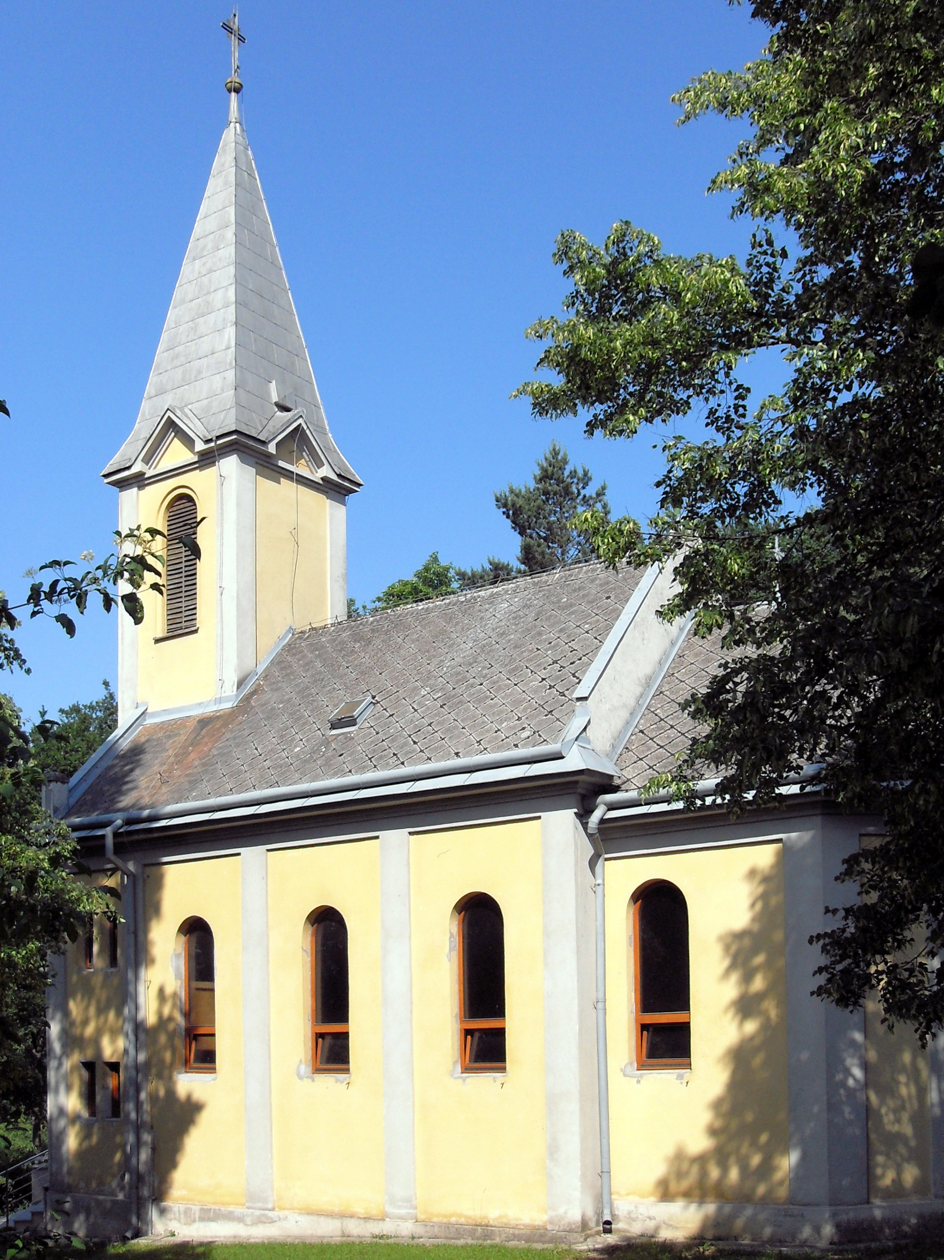 Košice-Lorinčík, Rímskokatolícky kostol svätého Vavrinca